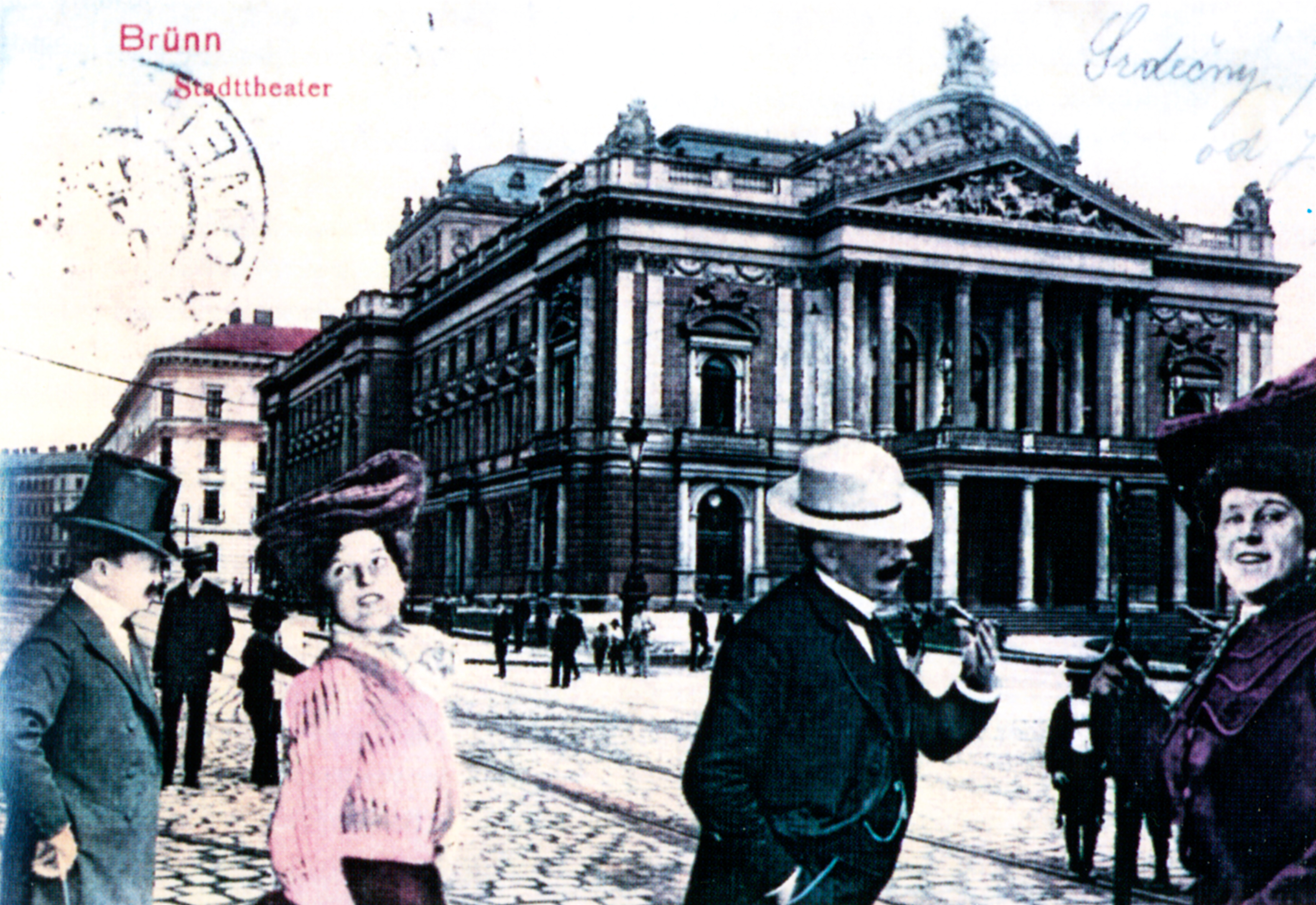 Brünn, Stadttheater, historische Ansichtskarte, 1903